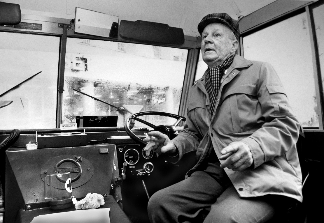 Den 19 april 1945 började de vit bussarna köra koncentrationsläger fångar från Tyskland. Som ung värnpliktig var Stig Svensson frivillig chaufför på en av det vita rödakors bussarna. - Jag kommer aldrig att glömma det jag varit med om, berättade han i en intervju 1992.